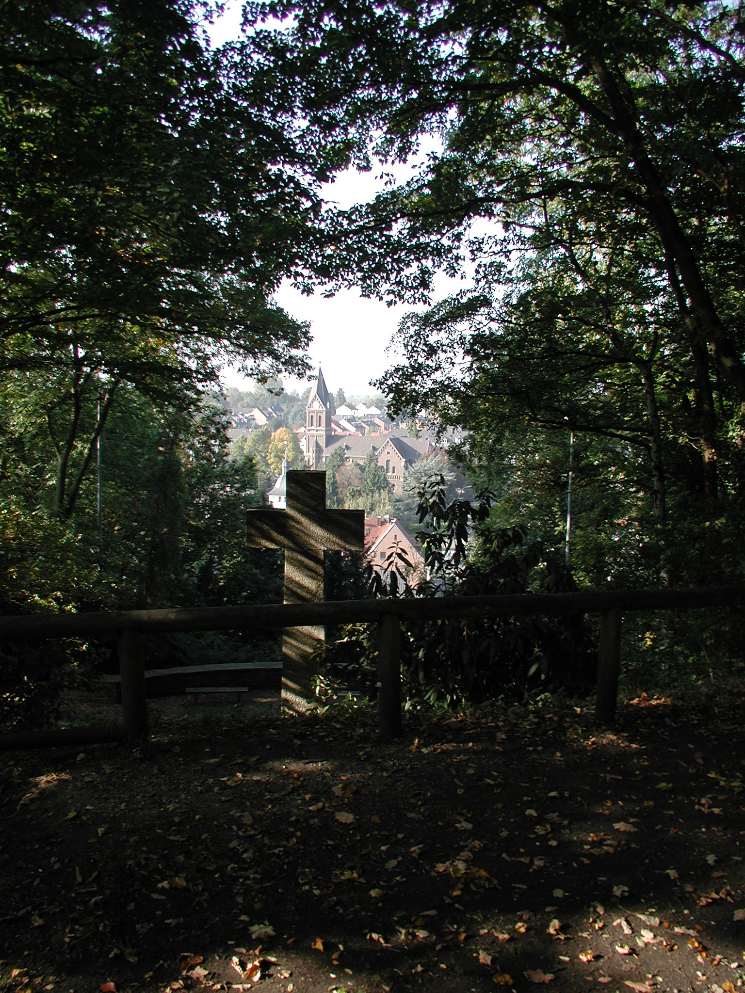 Hürth - Alt-Hürth, Ehrenmal